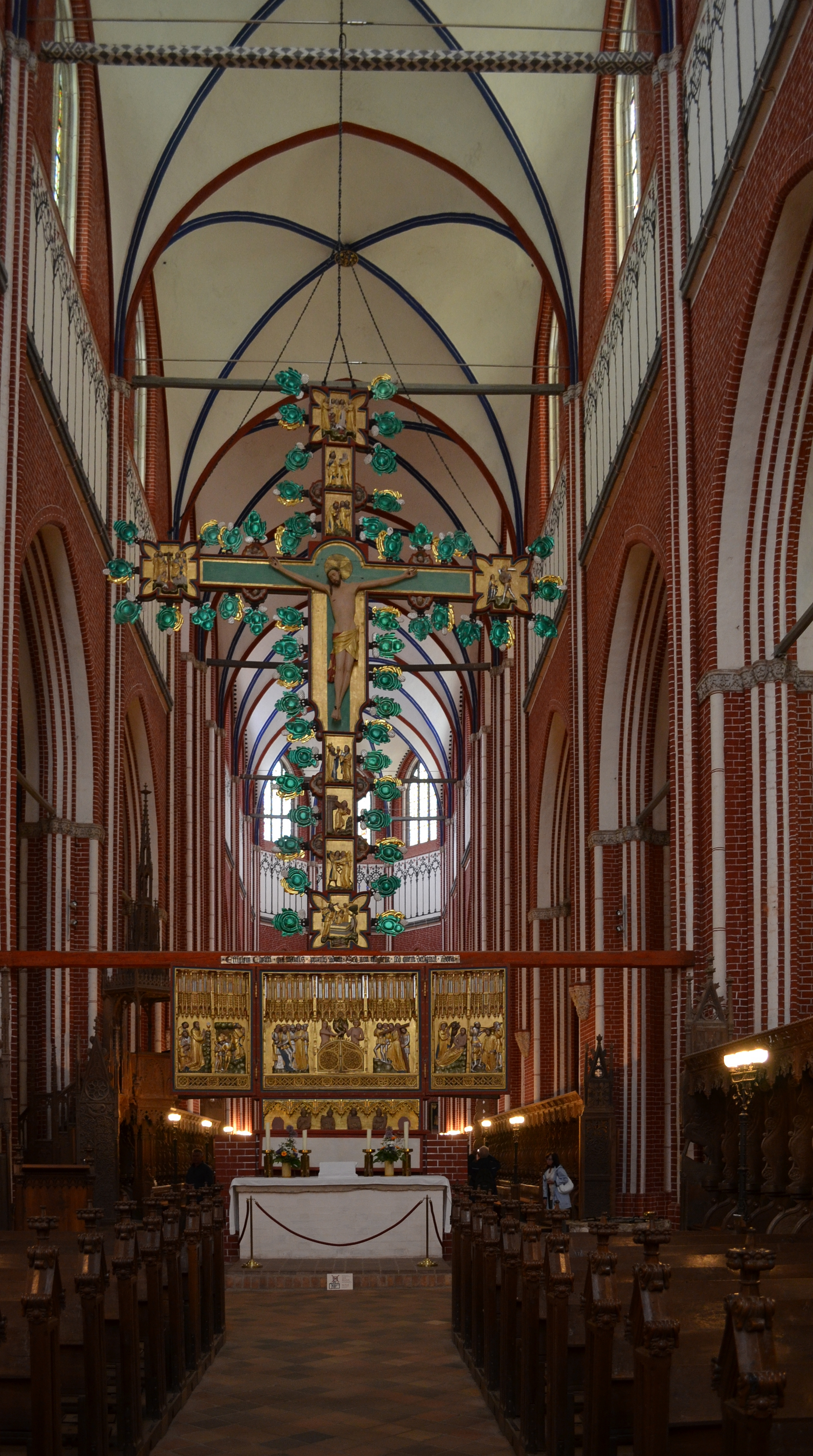 Bad Doberan, Münster, Mittelschiff von Westen nach Osten 2.1